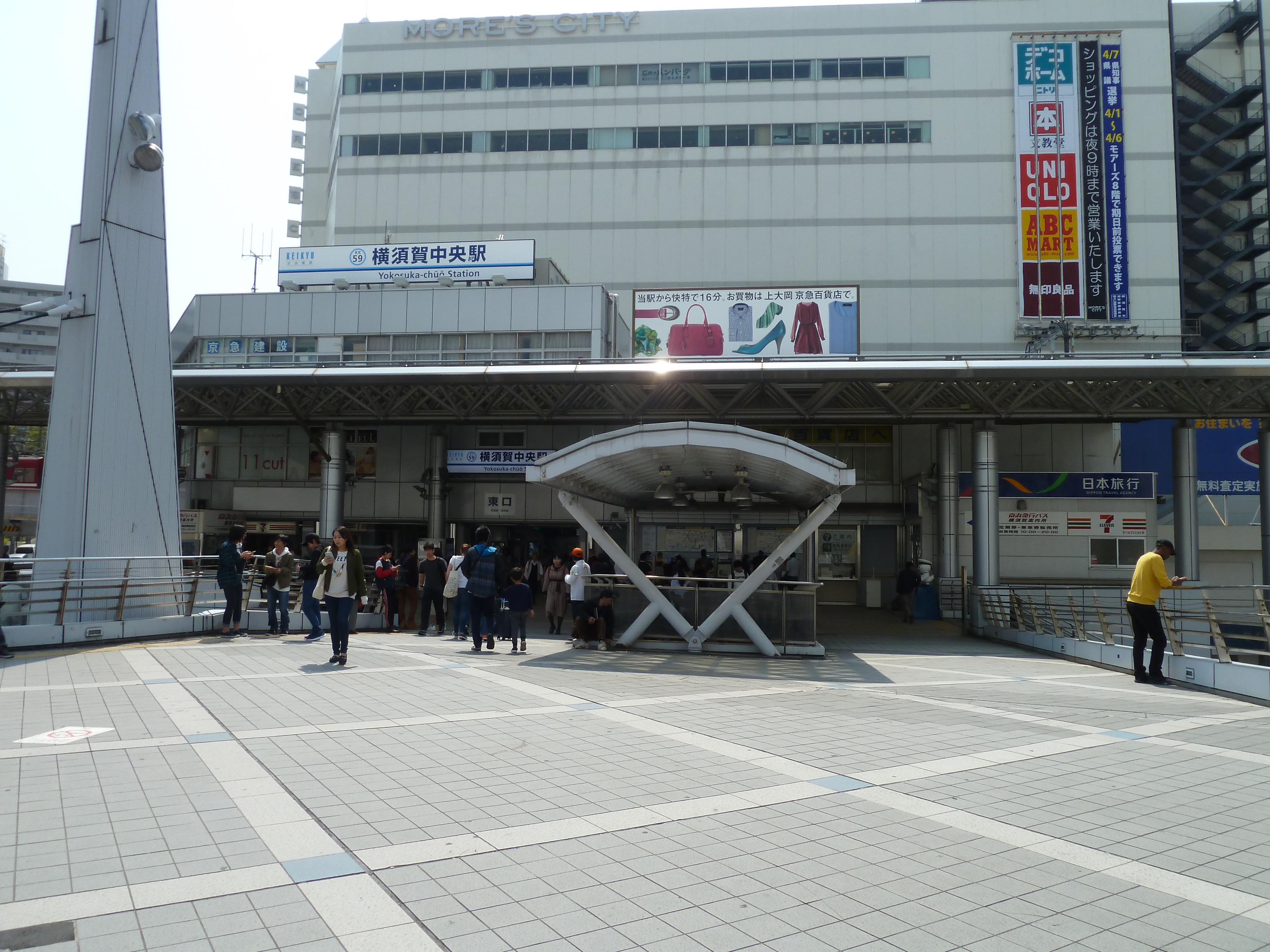 駅名標交換後の横須賀中央駅